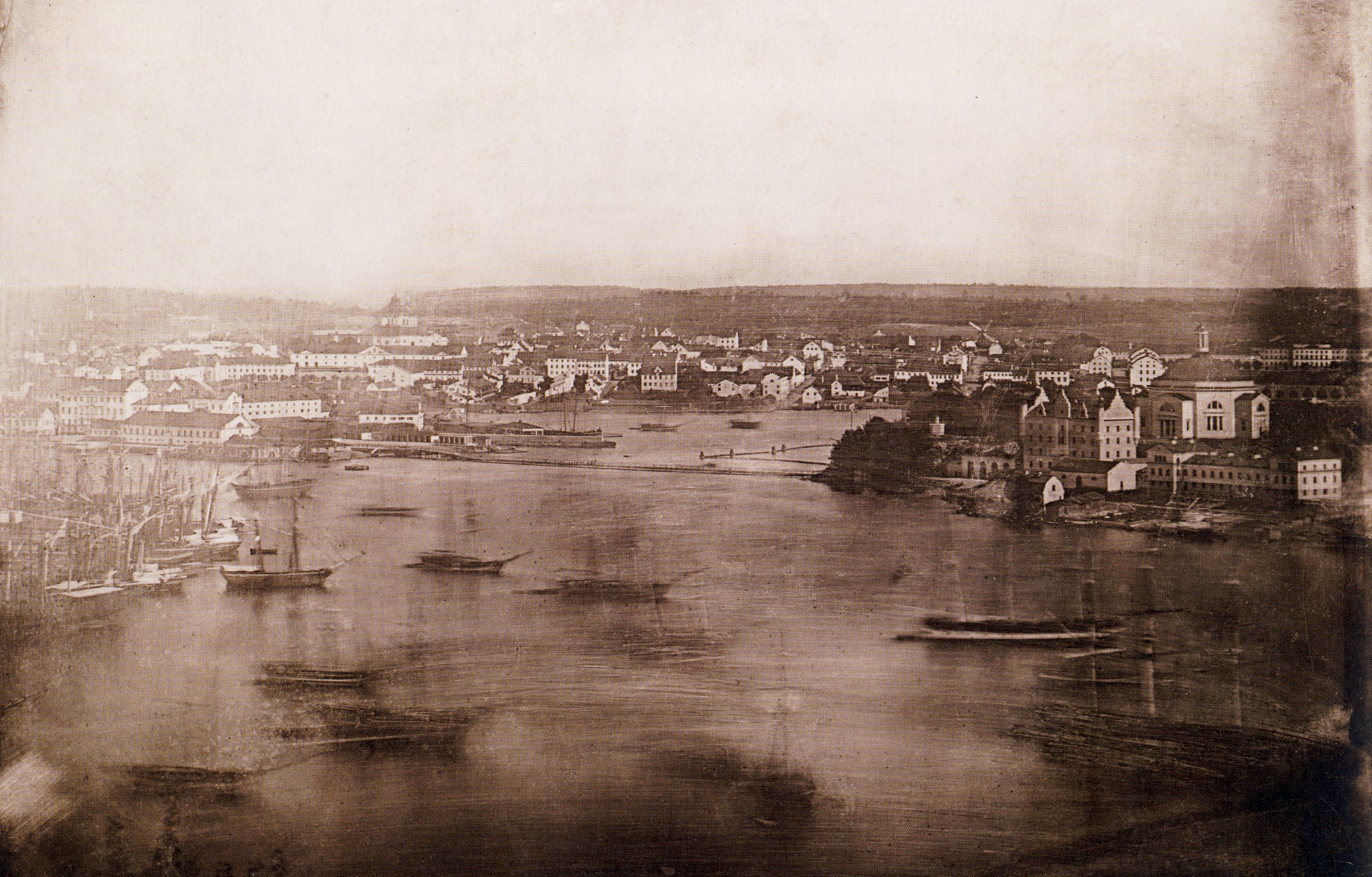 Utsikt över Stockholm från Mosebacke på Södermalm, del 1